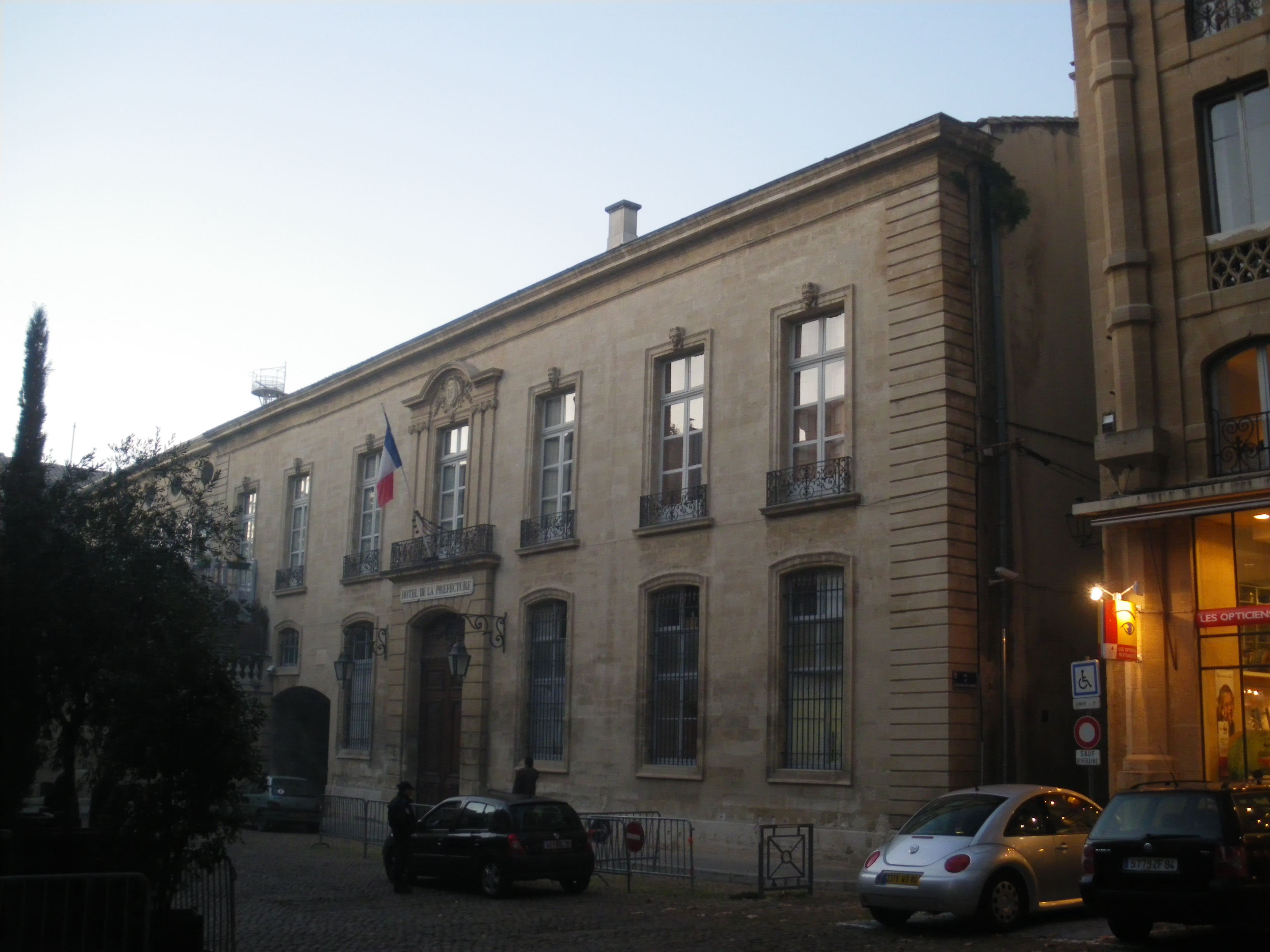 Préfecture du Vaucluse à Avignon